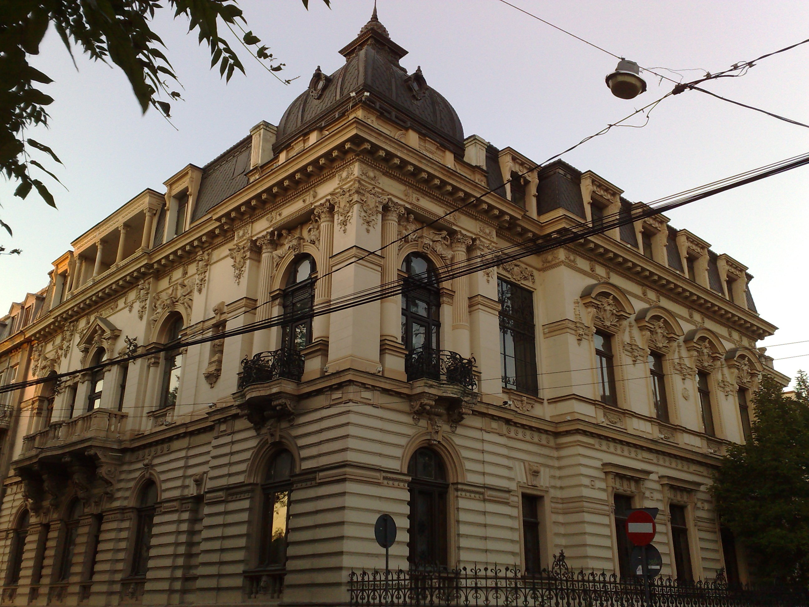 Biblioteca Academiei Române